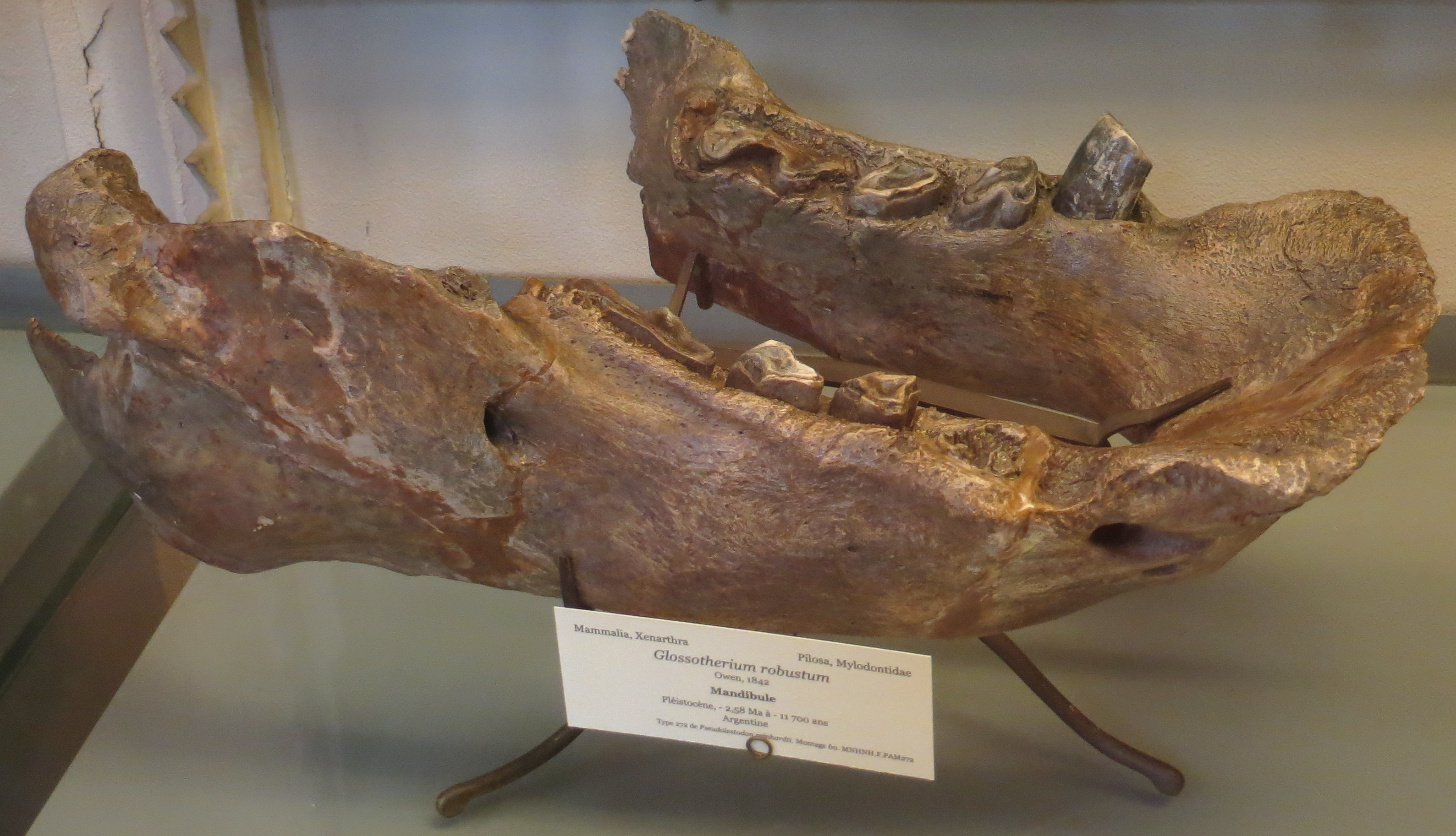 Fossil of Glossotherium